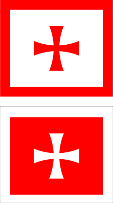 Crnogorske zastave iz vremena mitropolita Petrović-Njegoš.